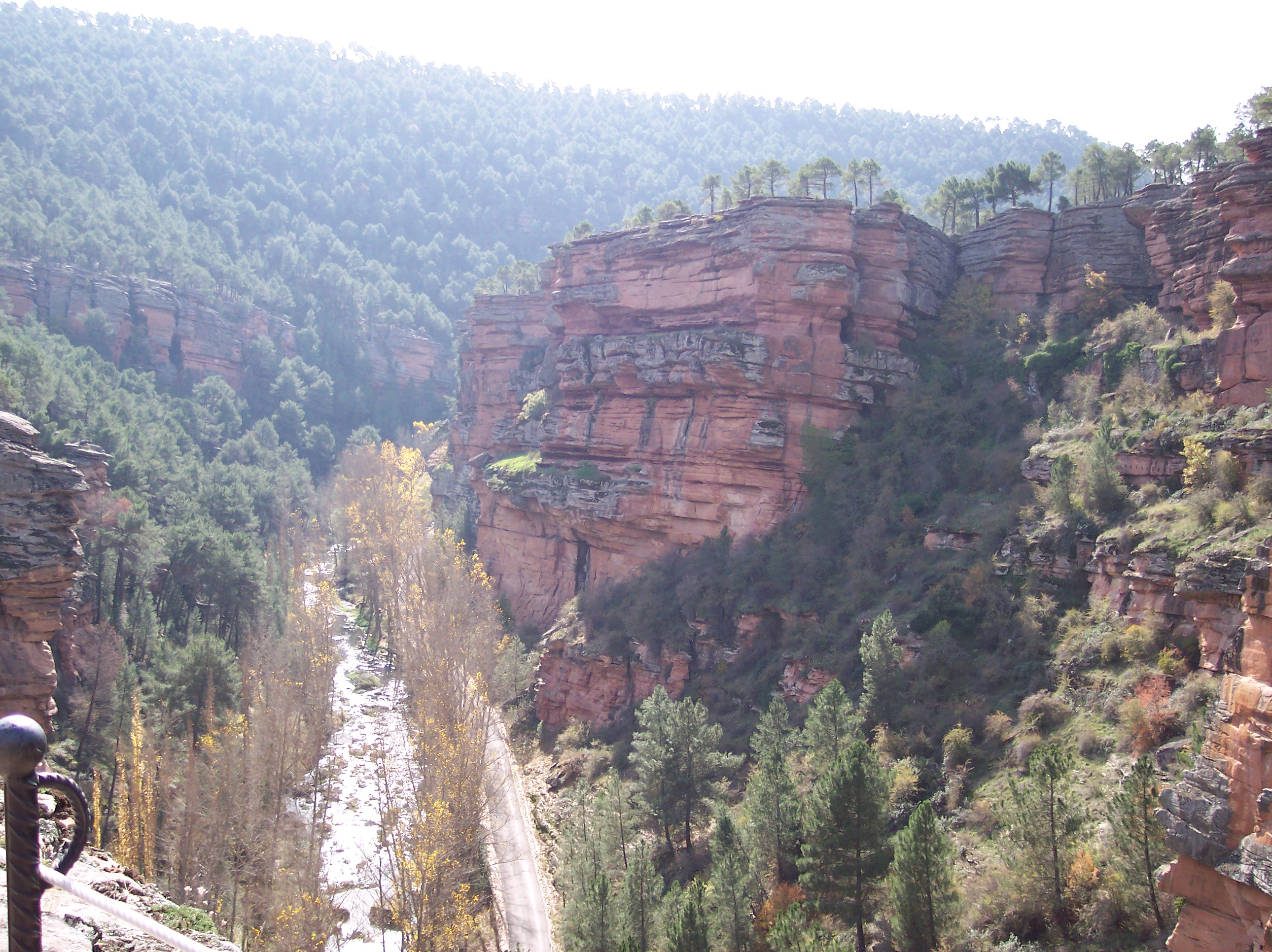 Barranco de la Virgen de la Hoz, río Gallo, Ventosa, Guadalajara, España